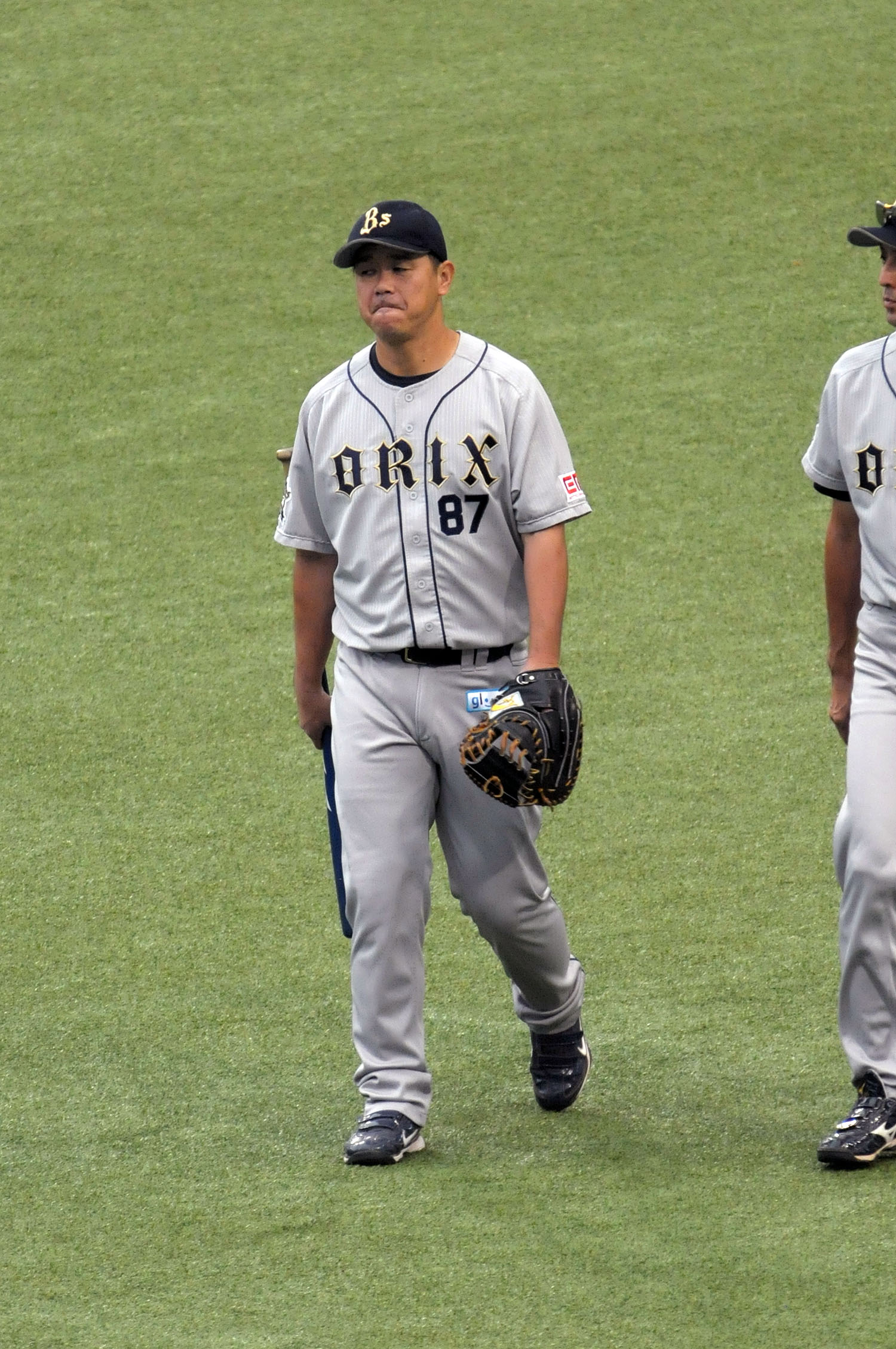 オリックス・バファローズ、赤堀元之コーチ。西武ドームで。